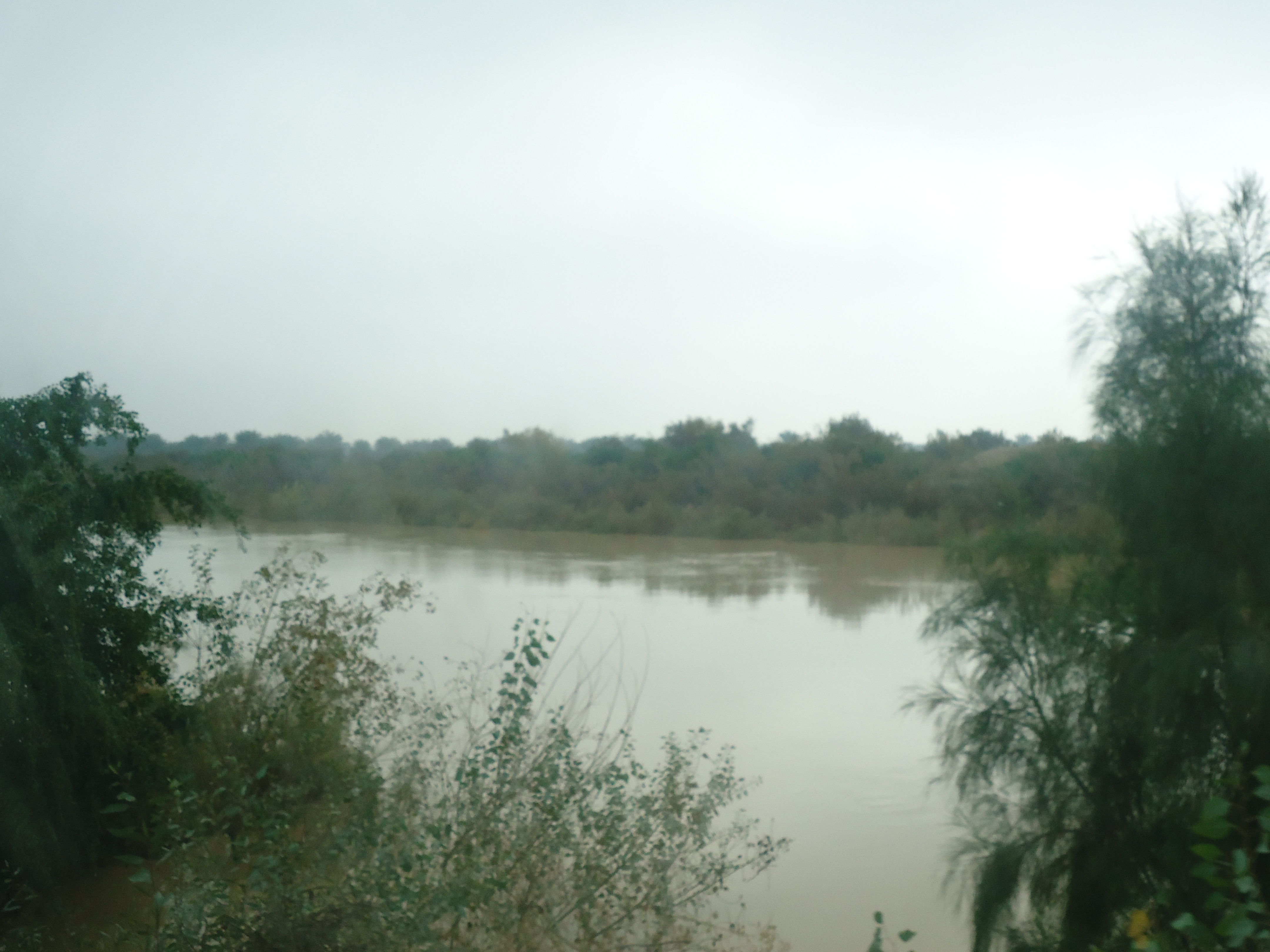 Jarahi River